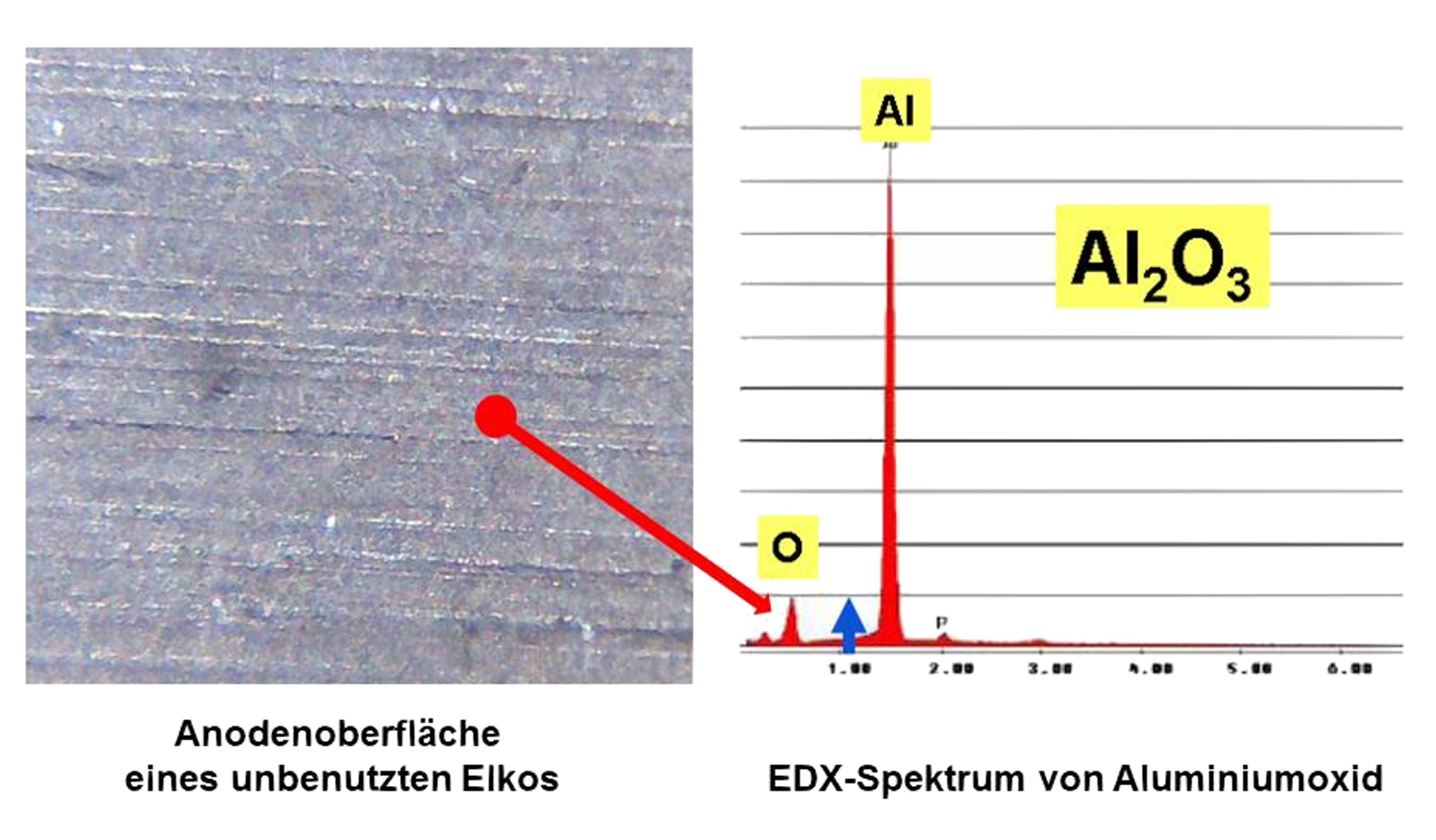 REM Aufnahme und EDX-Fingerprint einer jungfräulichen Elko-Anodenoberfläche